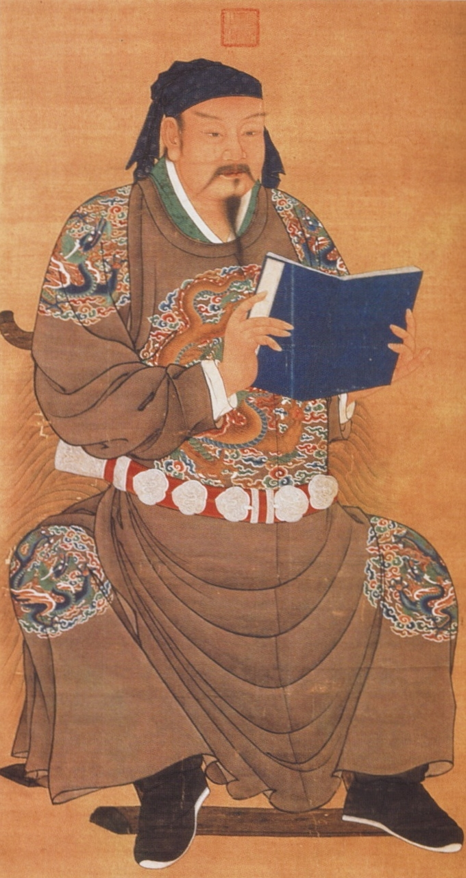 中文（中国大陆）: 岳飞画像